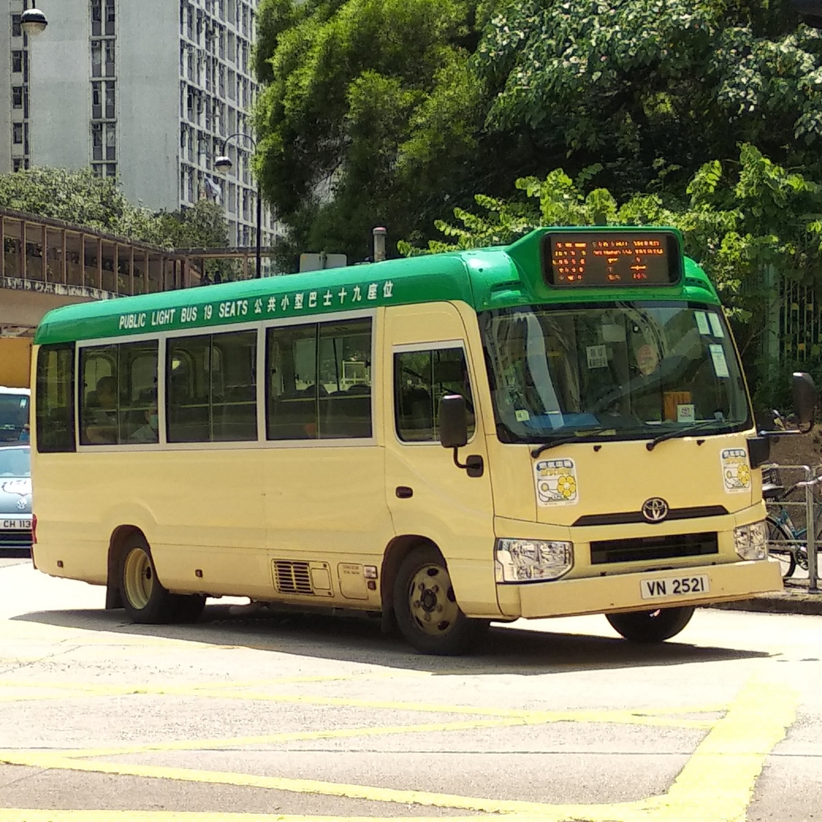 中文（香港）: 正左轉駛上大窩口道的新界區專線小巴407線。